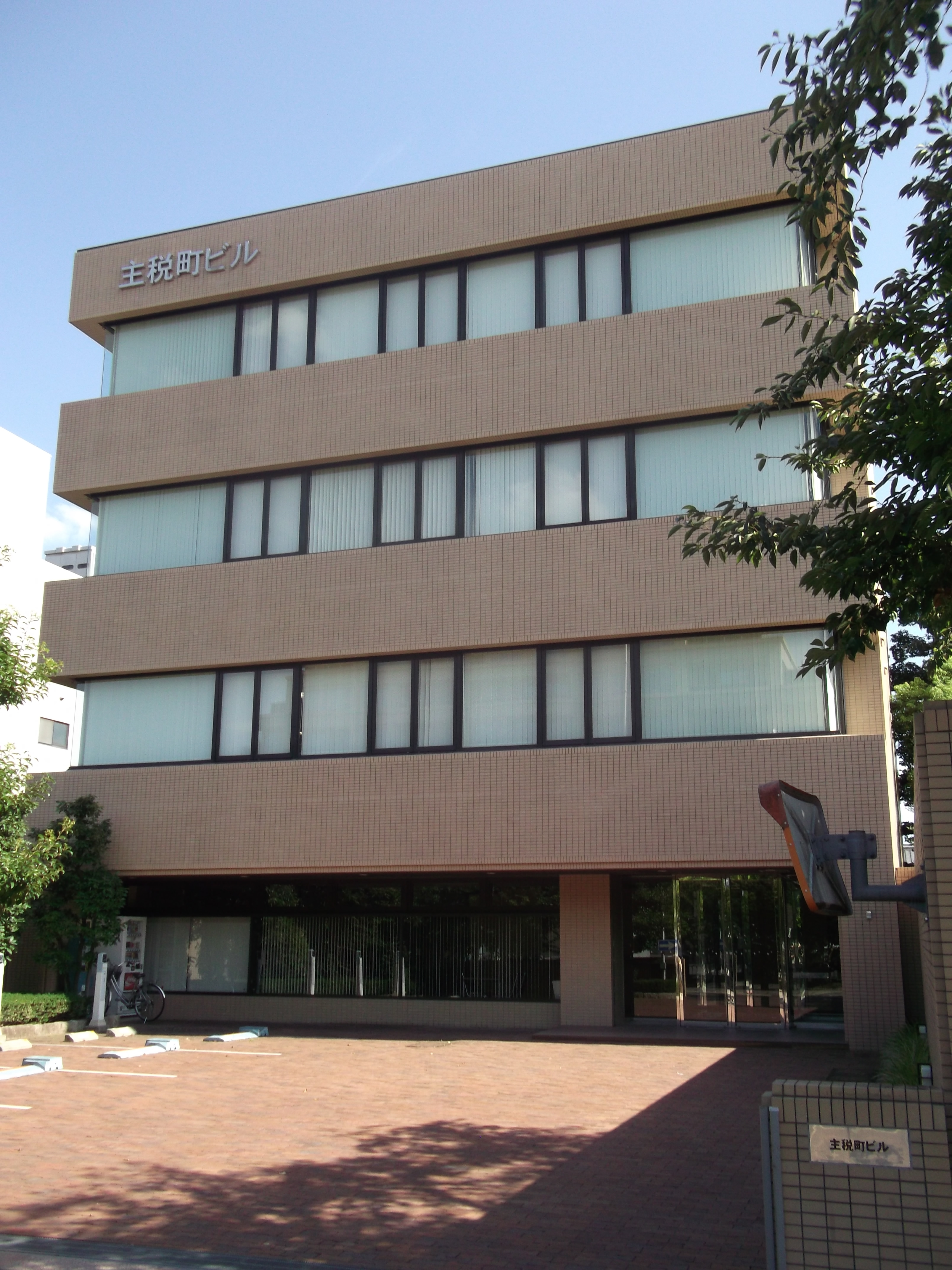 名古屋市東区の主税町ビルを北側公道より撮影